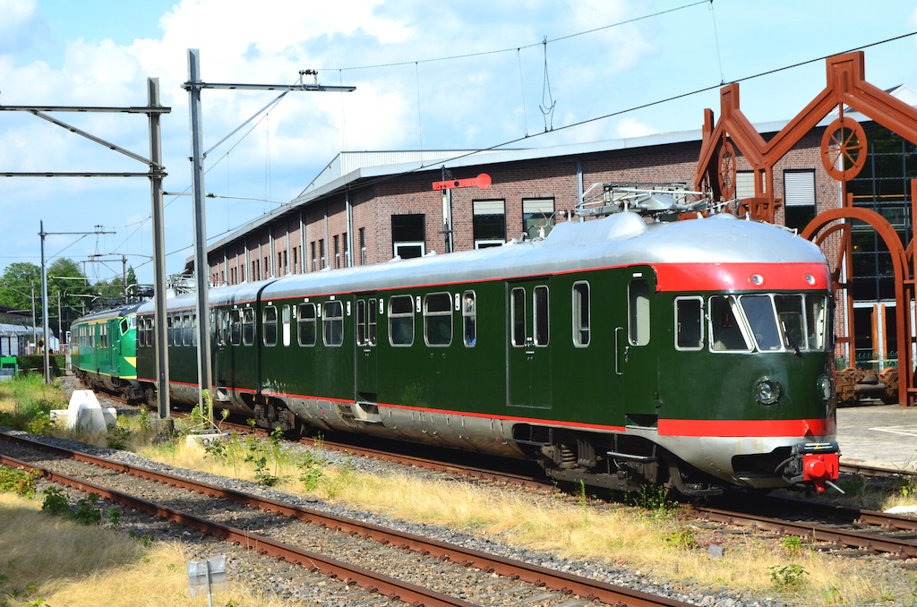 Nederlands Spoorwegmuseum treinstel NS 273. Foto: Erik Swierstra.